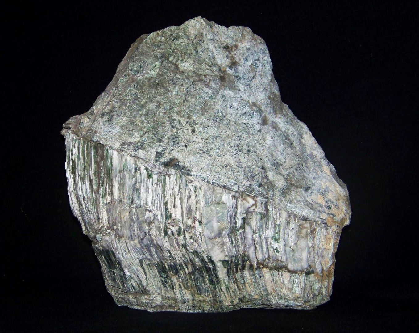 Serpentynit z żyła antygorytowo-kwarcową, masyw serpentynitowy Strzegom-Sobótka, Dolny Śląsk, Polska